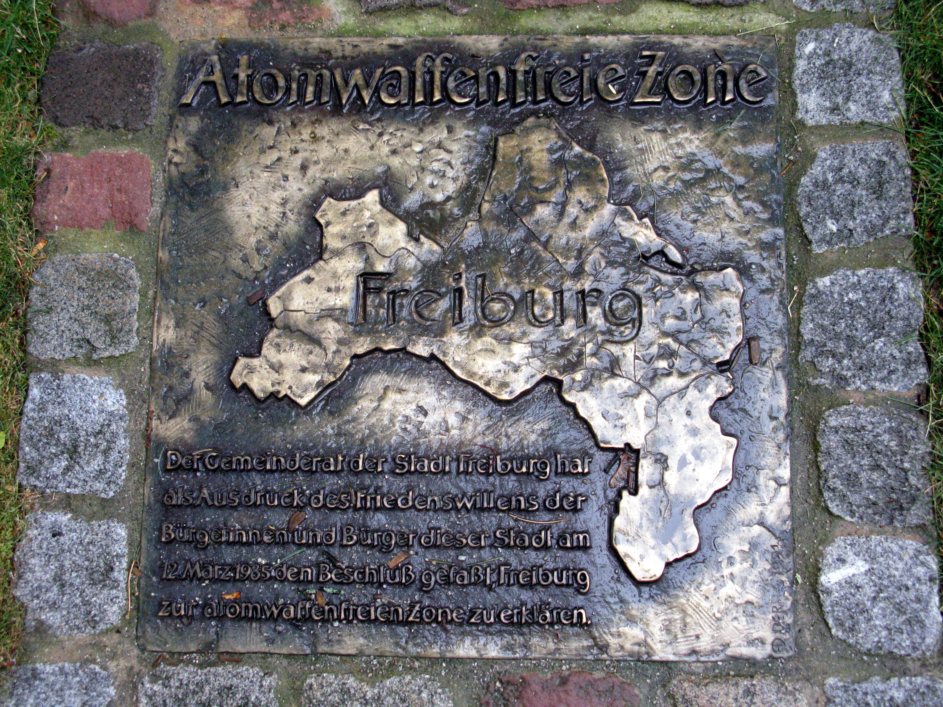 Tafel Atomwaffenfreie Zone auf dem Kinderspielplatz in der Freiburger Kreuzstraße, auch Hildaspielplatz genannt